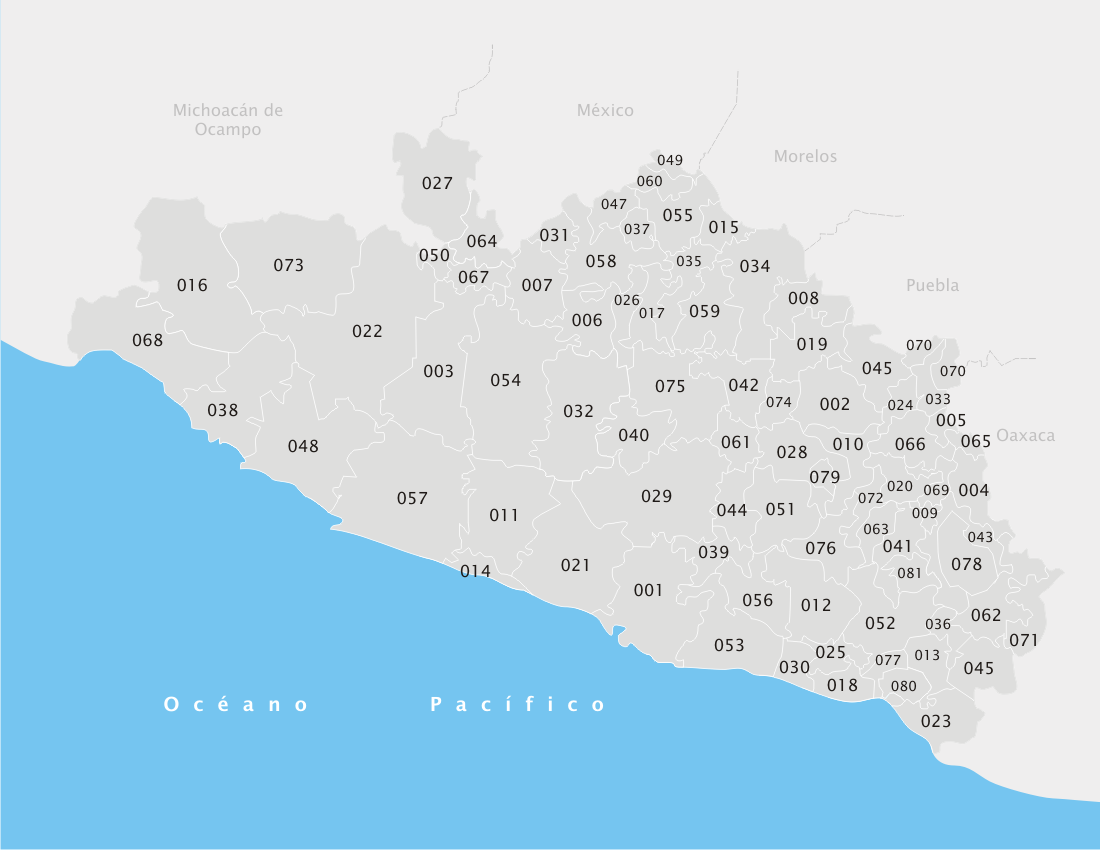 Mapa de Guerrero (México) con división política, para ver la clave, visite Municipios de Guerrero